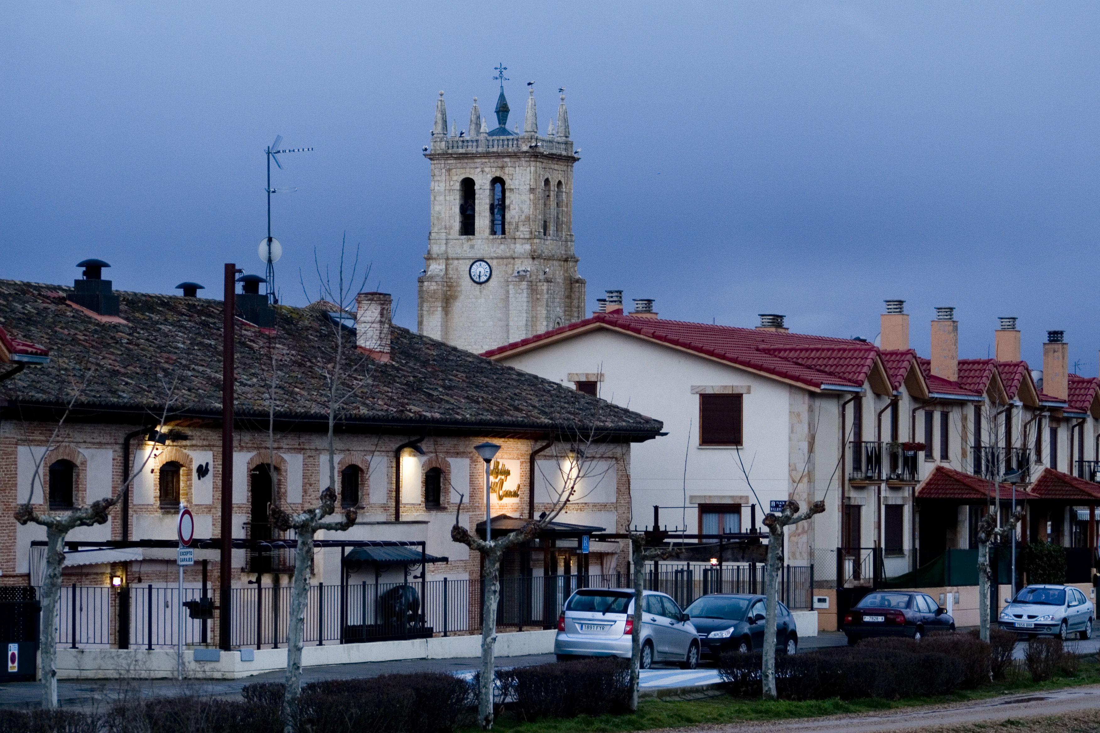 Villamuriel de Cerrato, Palencia Canon 30D, Canon 75-300